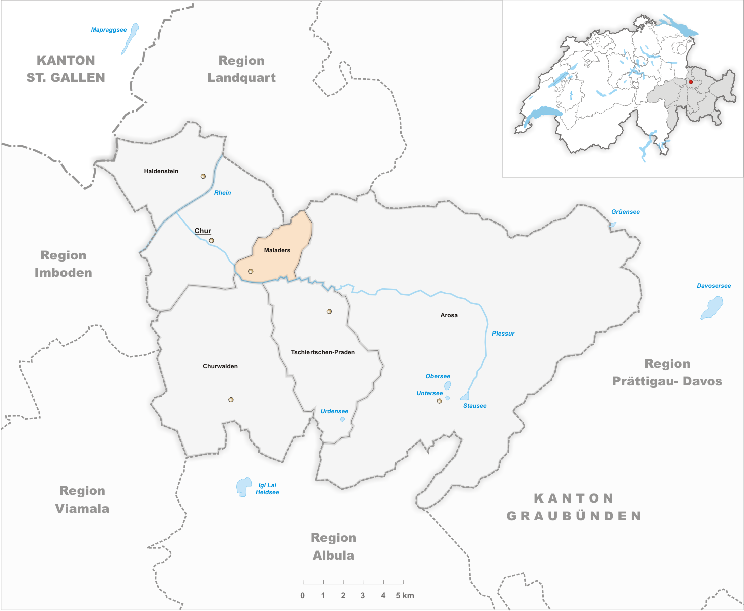 Municipality Maladers